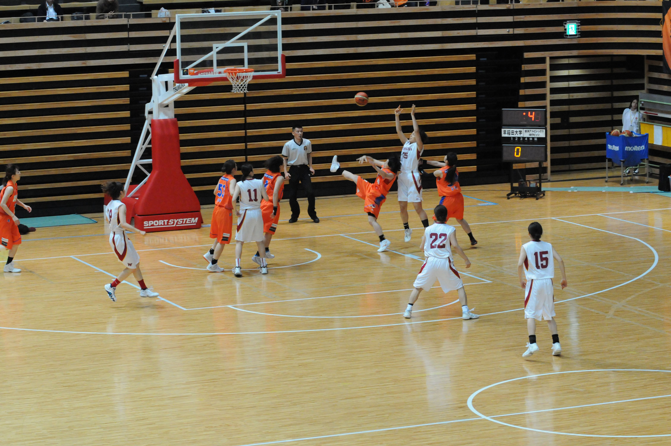 2015年全日本総合バスケットボール選手権大会3回戦、早稲田大学対新潟アルビレックスBBラビッツ。大田区総合体育館で。